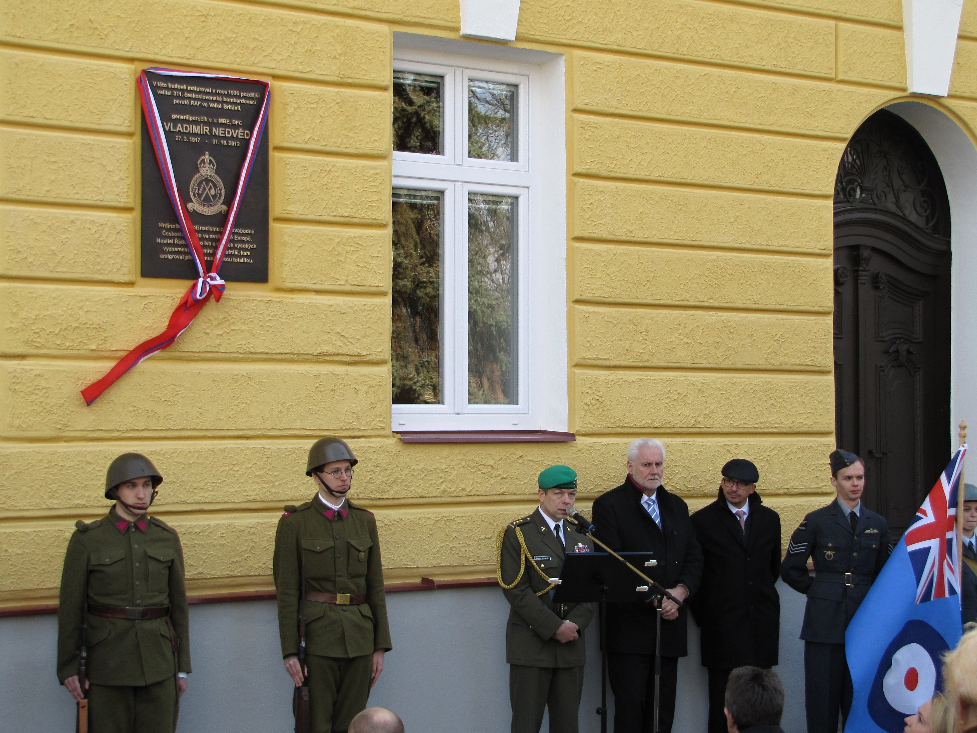 Slavnostní odhalování pamětní desky Vladimíra Nedvěda na budově Klvaňova gymnázia v Kyjově 26.3.2017